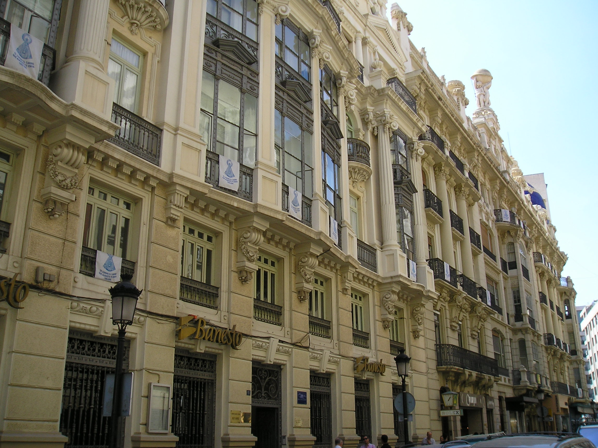 Edificios de la calle Marqués de Molins, Albacete. Imagen de un edificio de la calle Marqués de Molins de Albacete.